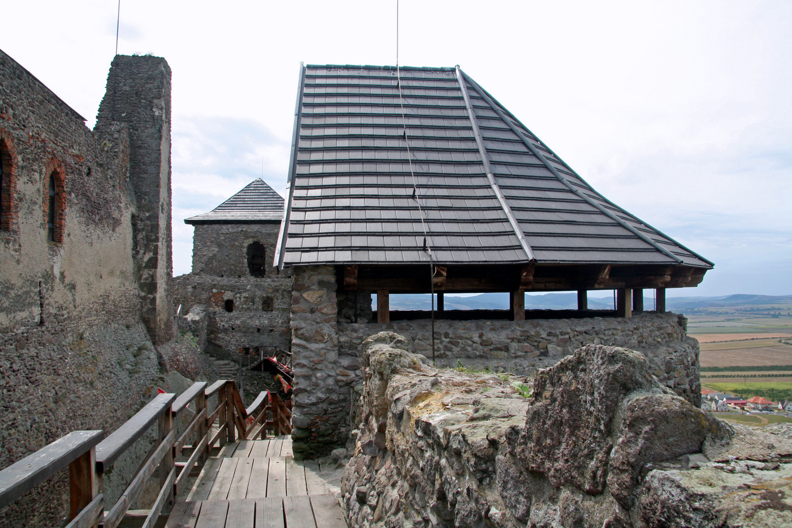 Várrom (Boldogkőváralja, Zempléni Tájvédelmi Körzet) This is a photo of a monument in Hungary, Identifier: 2684